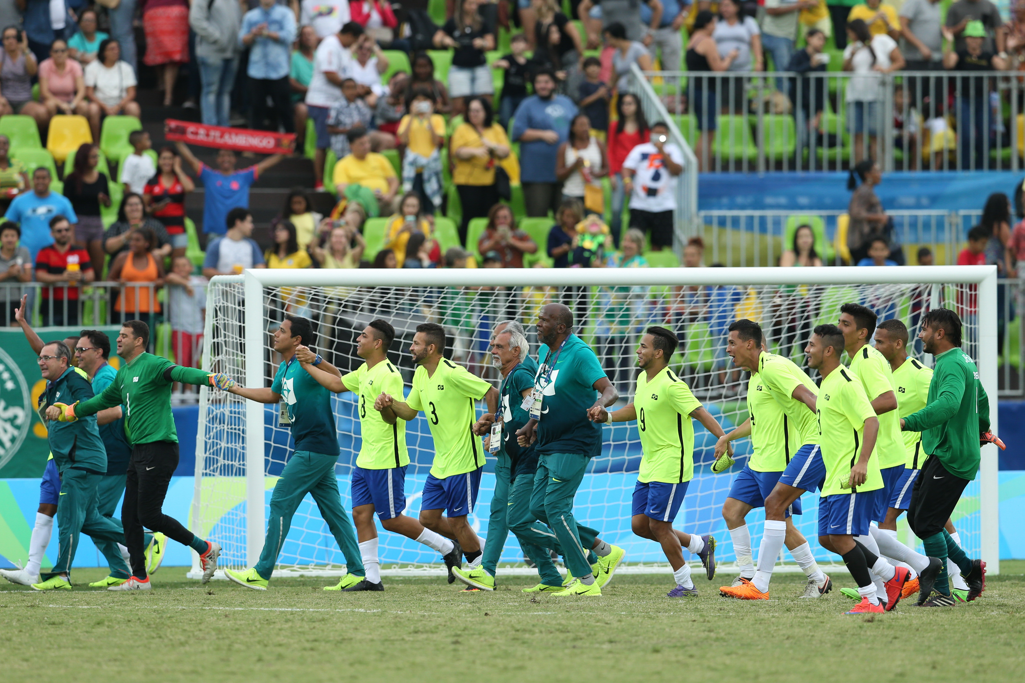 Rio de Janeiro - Time brasileiro de futebol de 7 conquistou a medalha de bronze nos Jogos Paralímpicos do Rio de Janeiro, em jogo contra a Holanda (Tomaz Silva/Agência Brasil)